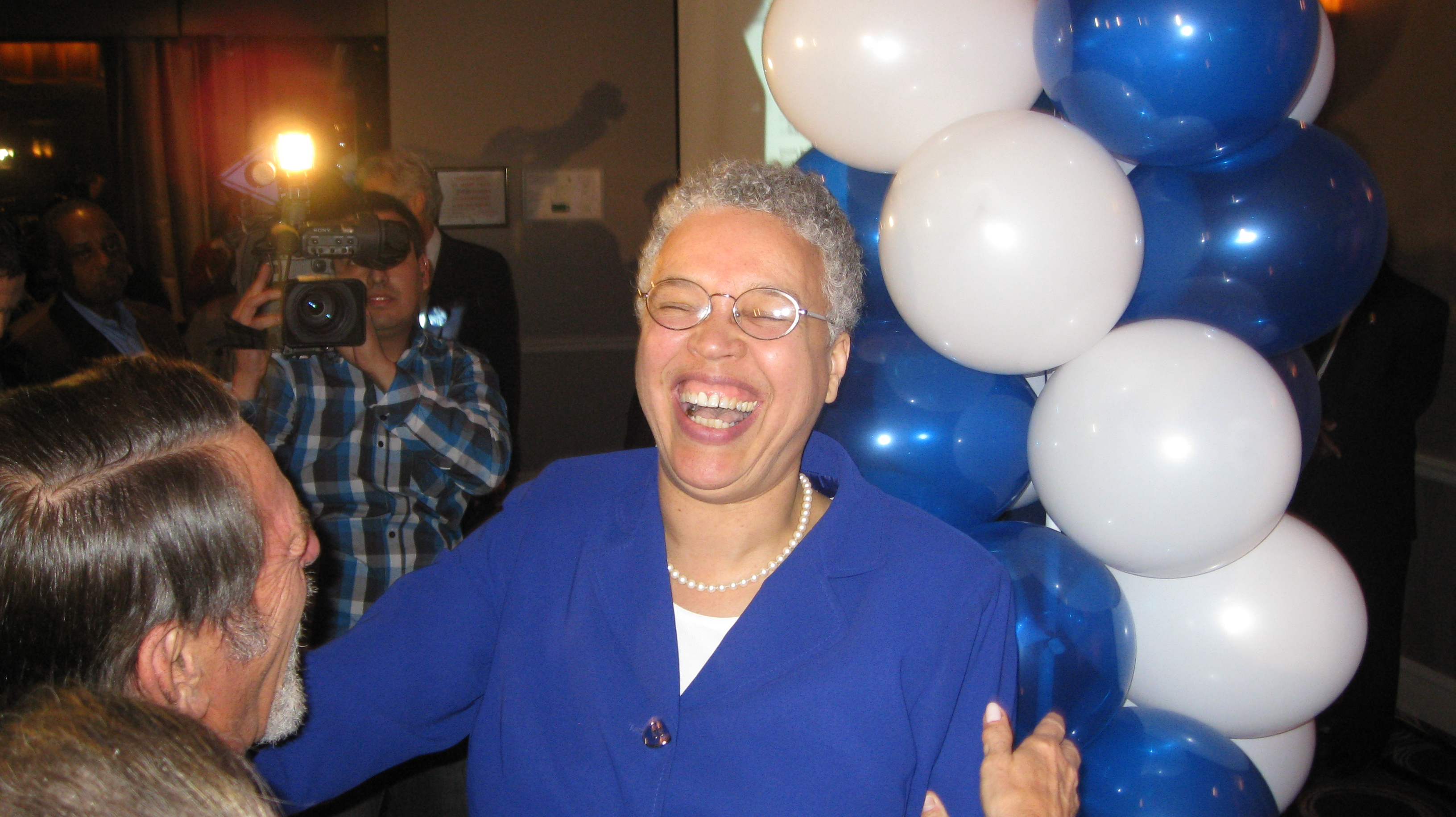 Preckwinkle wins